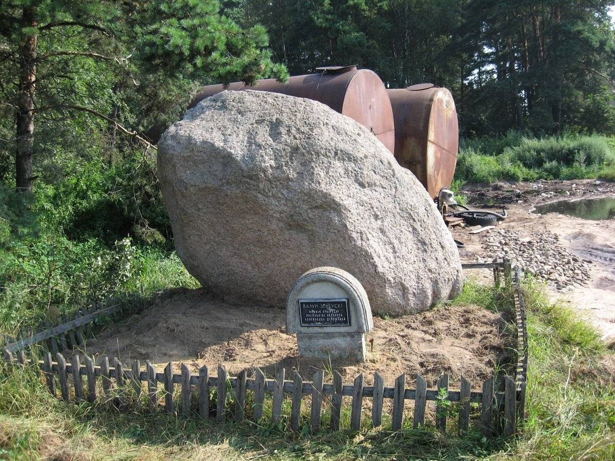 Зенеўцы. Зенеўскі камень